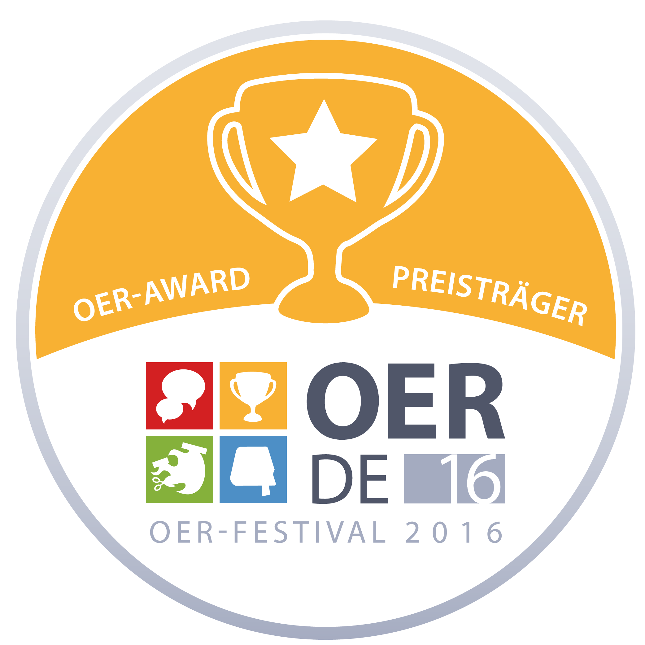 Badge vom OER-Festival 2016 für den OER-Award.